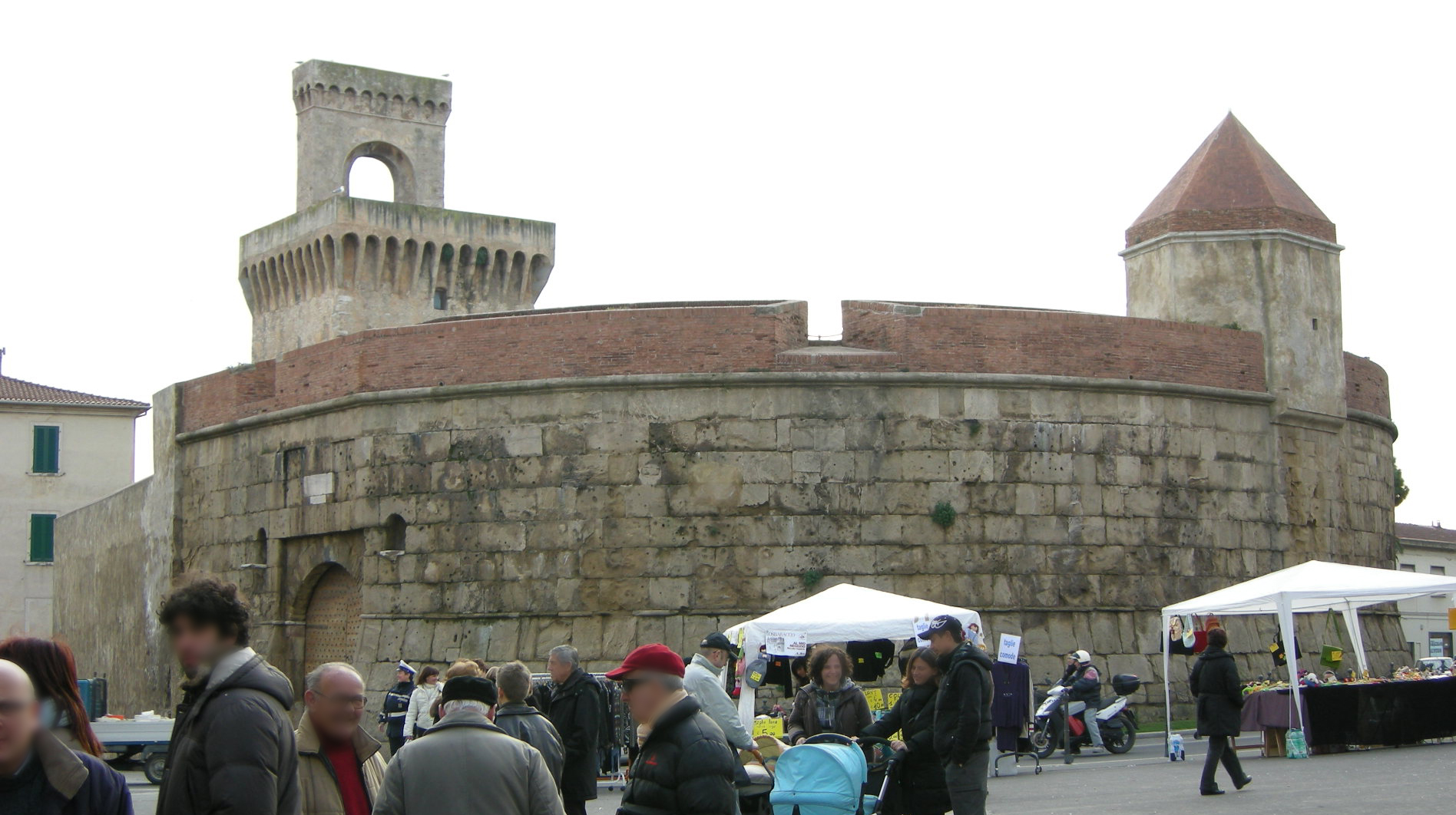 Torrione e Rivellino